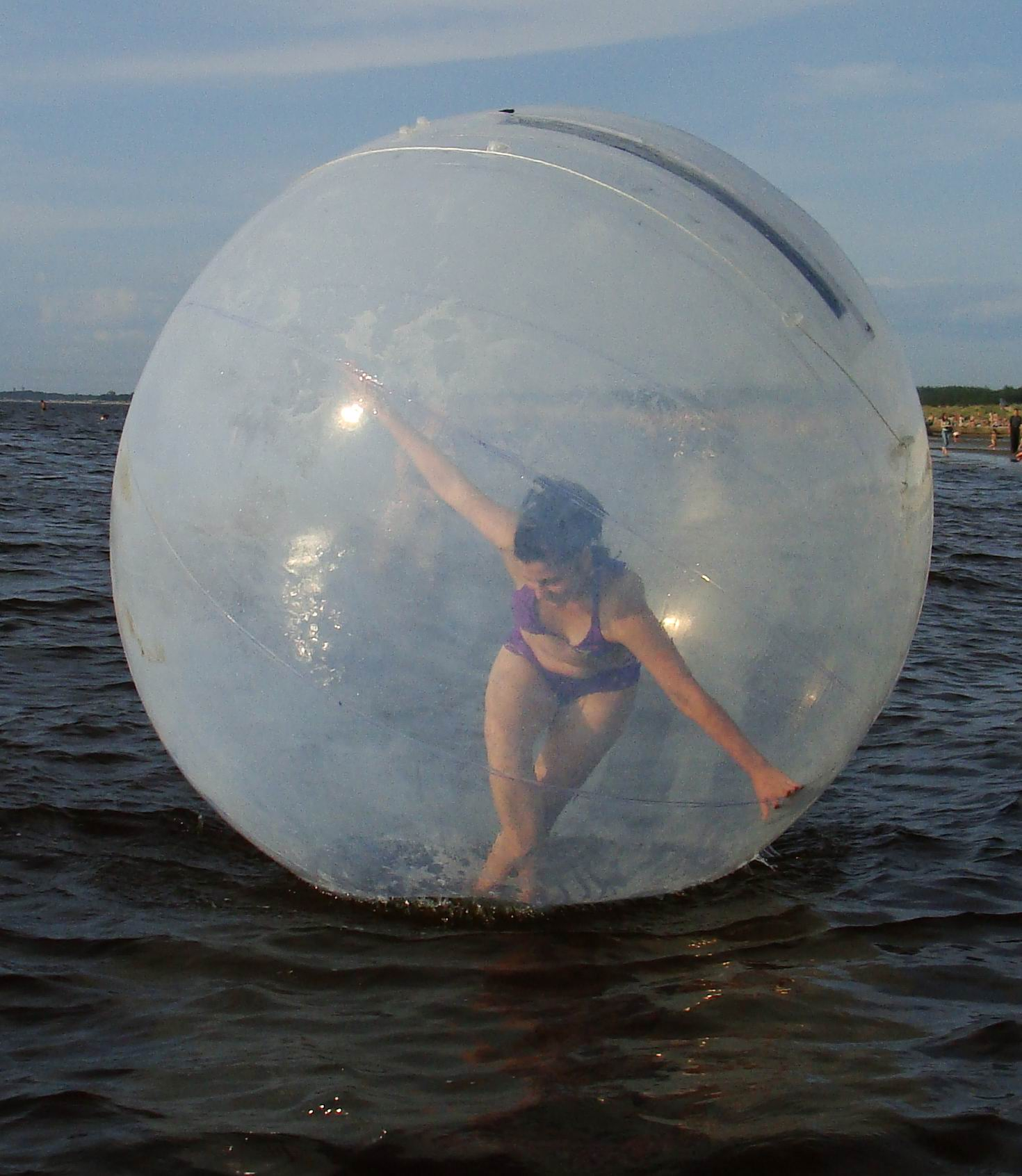 белое море